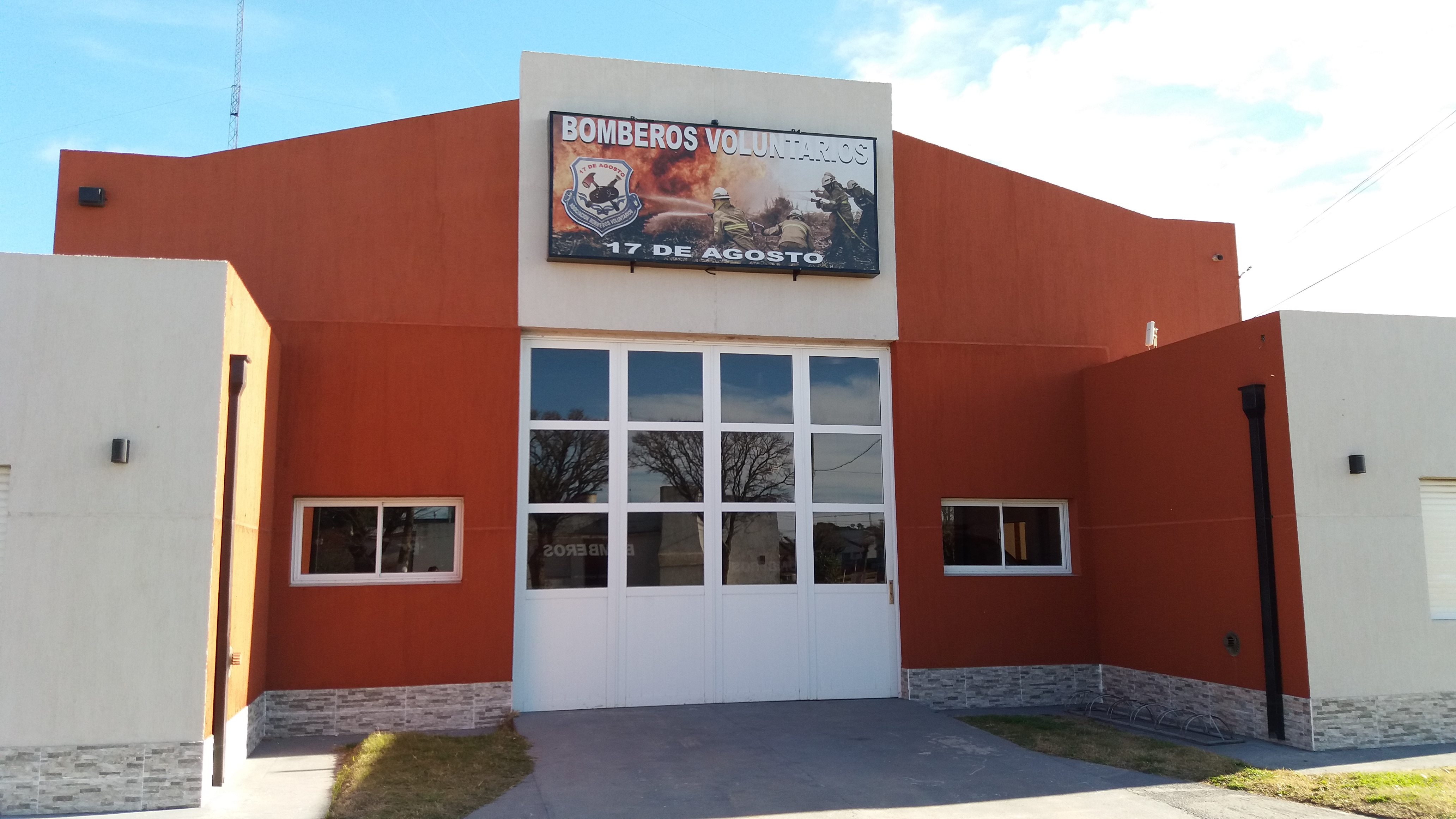 Cuartel de Bomberos Voluntarios 17 de Agosto (Diecisiete de Agosto, Partido de Puan, Provincia de Buenos Aires)